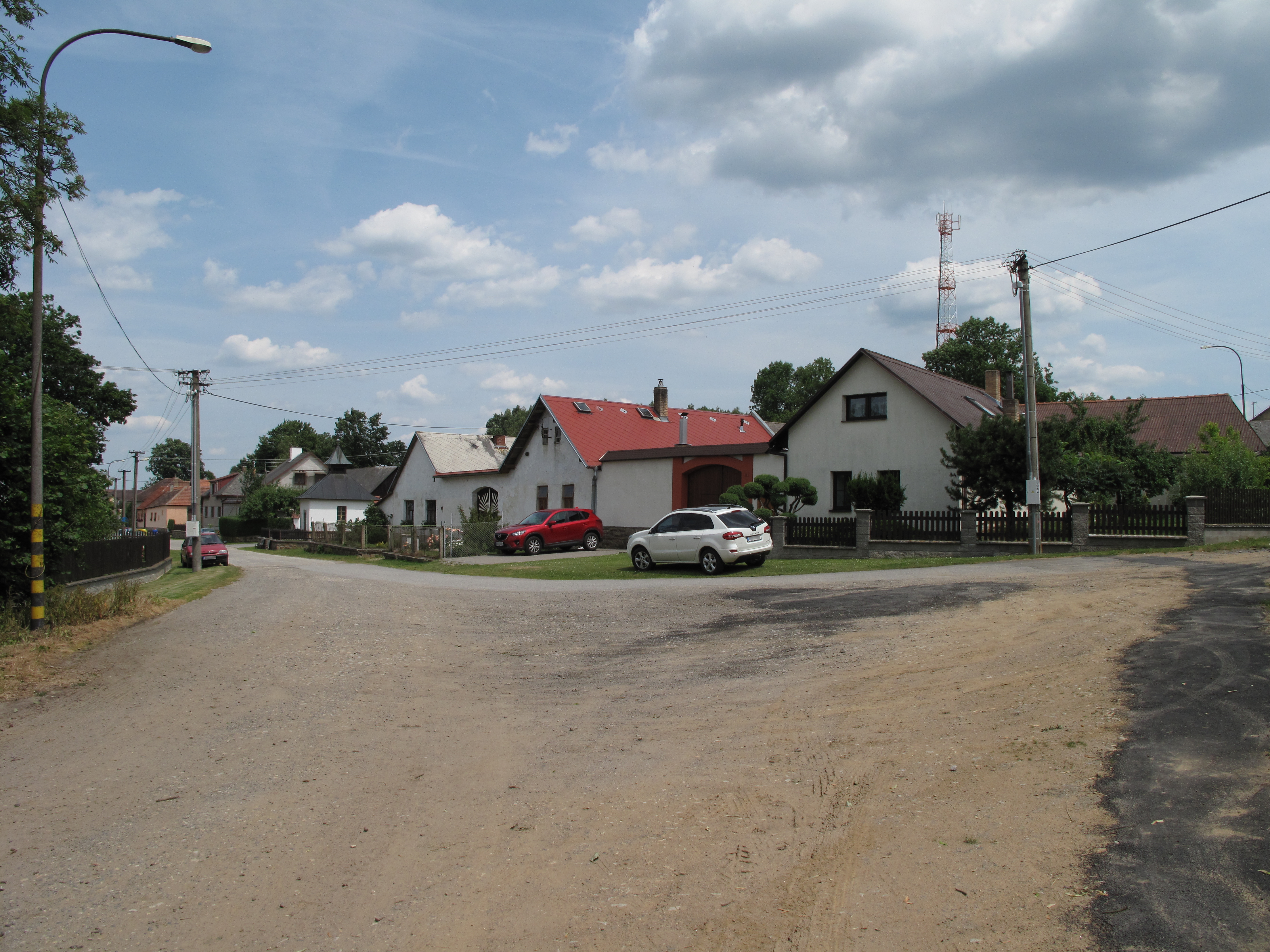 Náves v Jankově. Okres Pelhřimov, Česká republika.